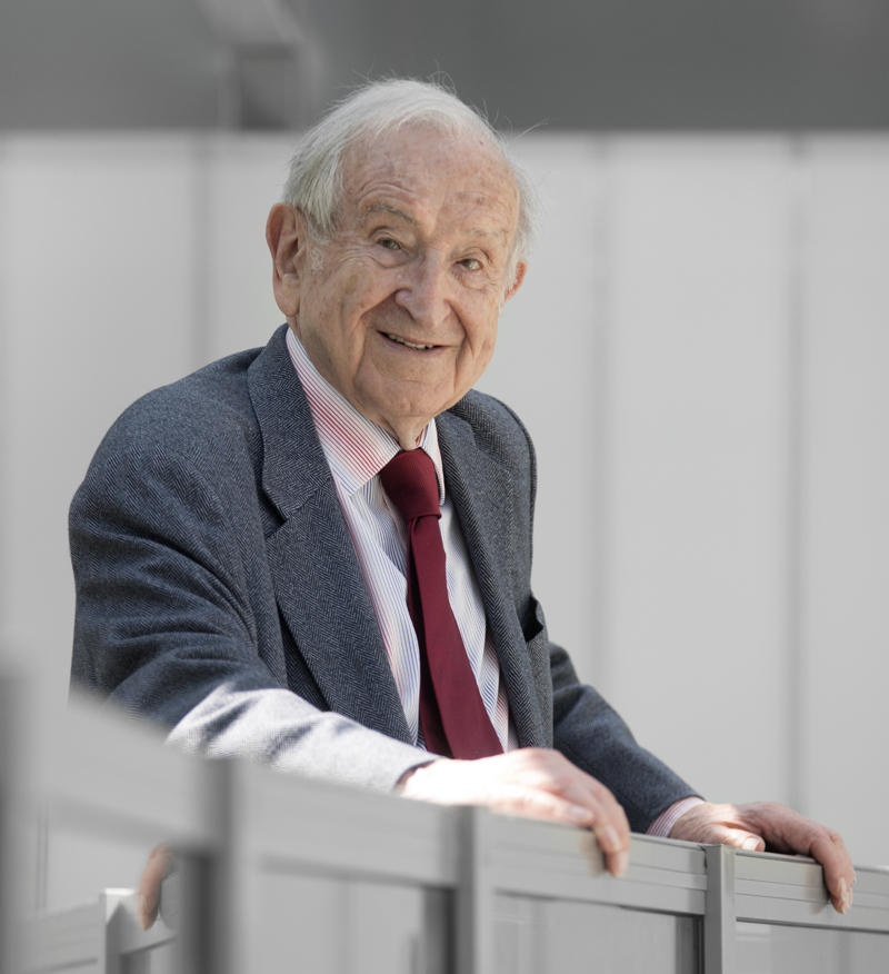 Joseph Rykwert w Międzynarodowym Centrum Kultury